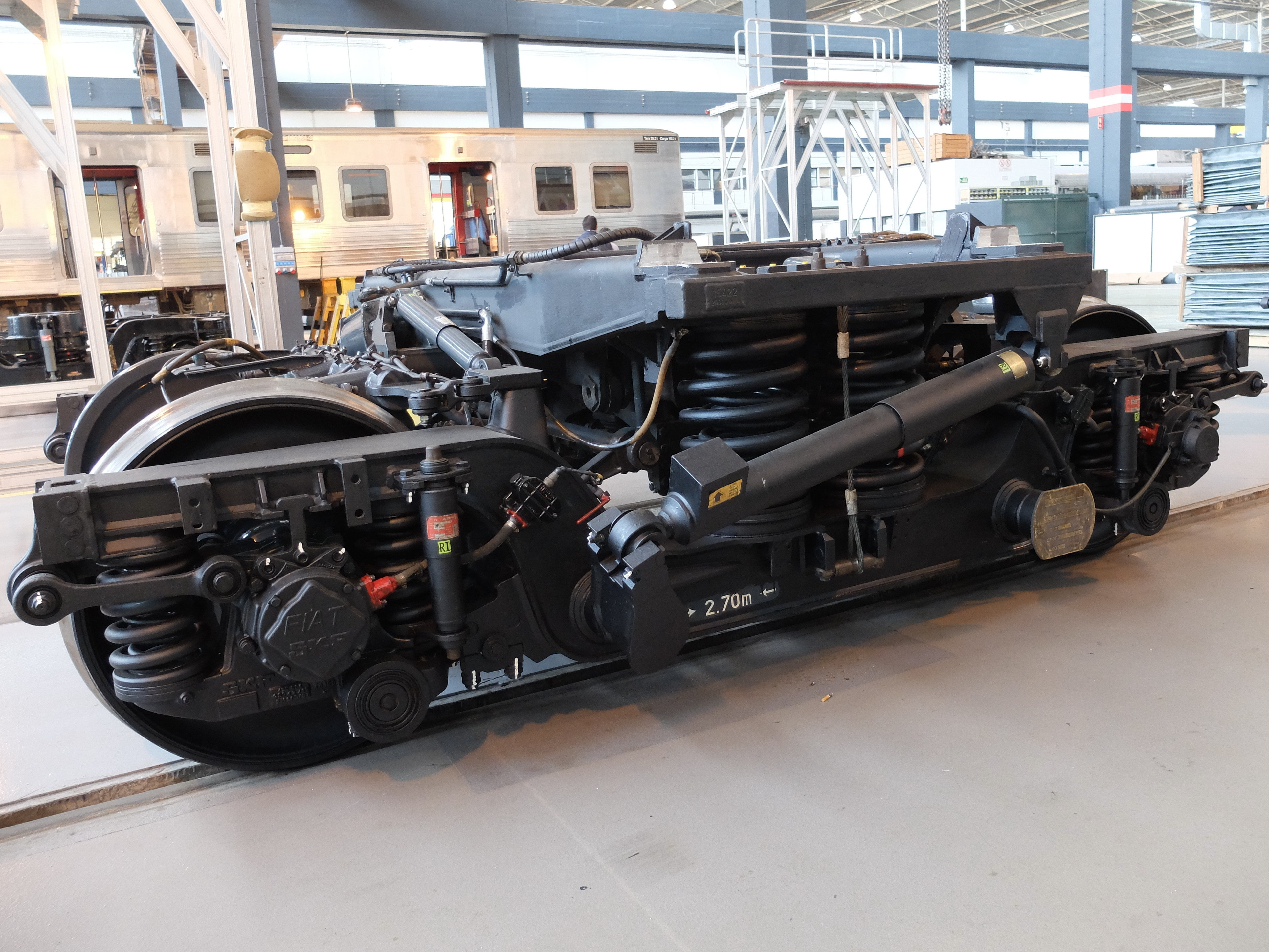 Aufarbeitetes Drehgestell eines Alfa Pendular